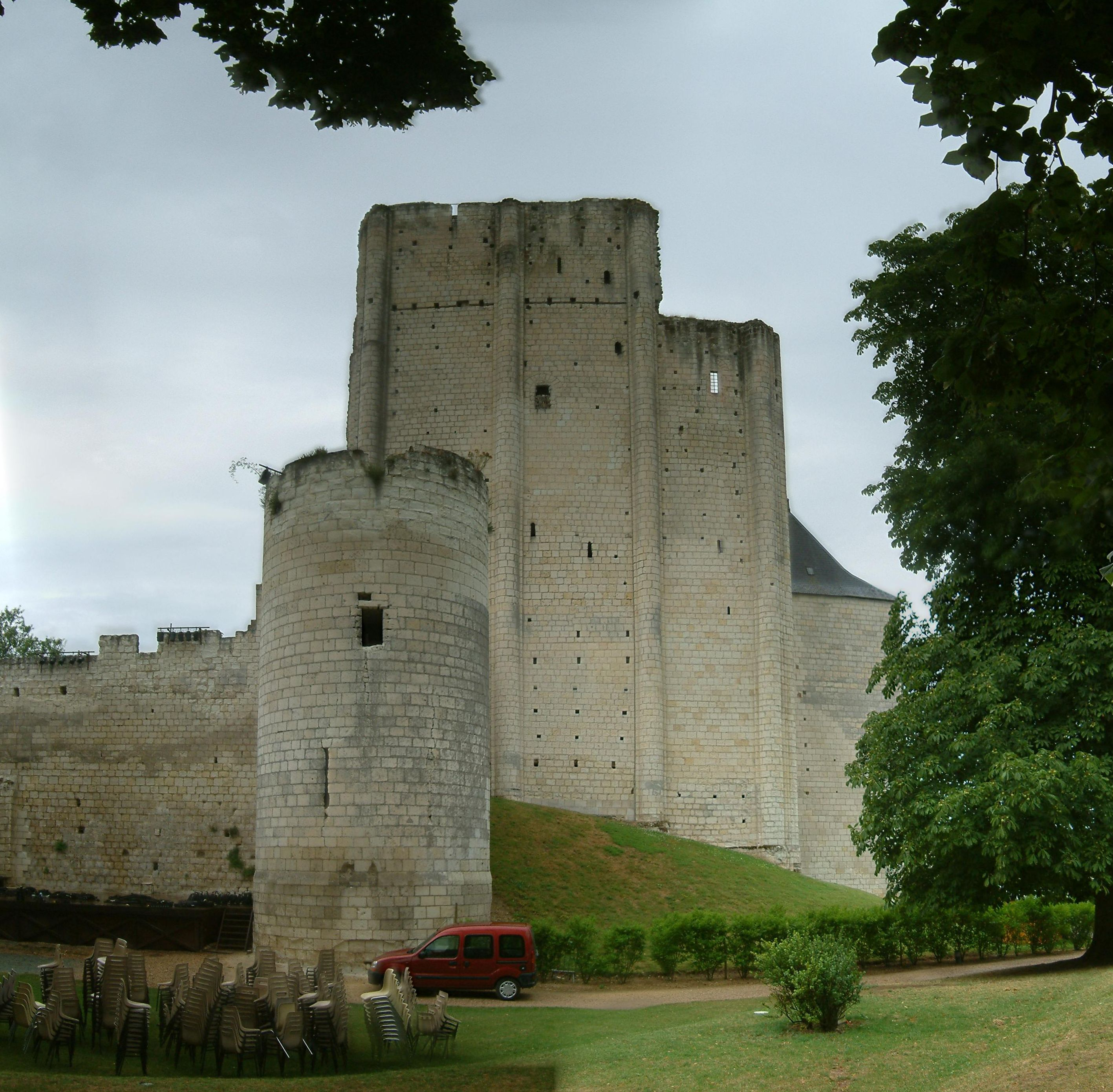 Château de Loches, Loches, FRANCE